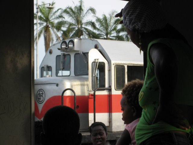 Locomotora del ferrocarril de Benguela.